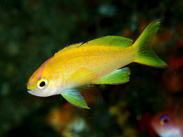 コウリンハナダイ Pseudanthias parvirostris